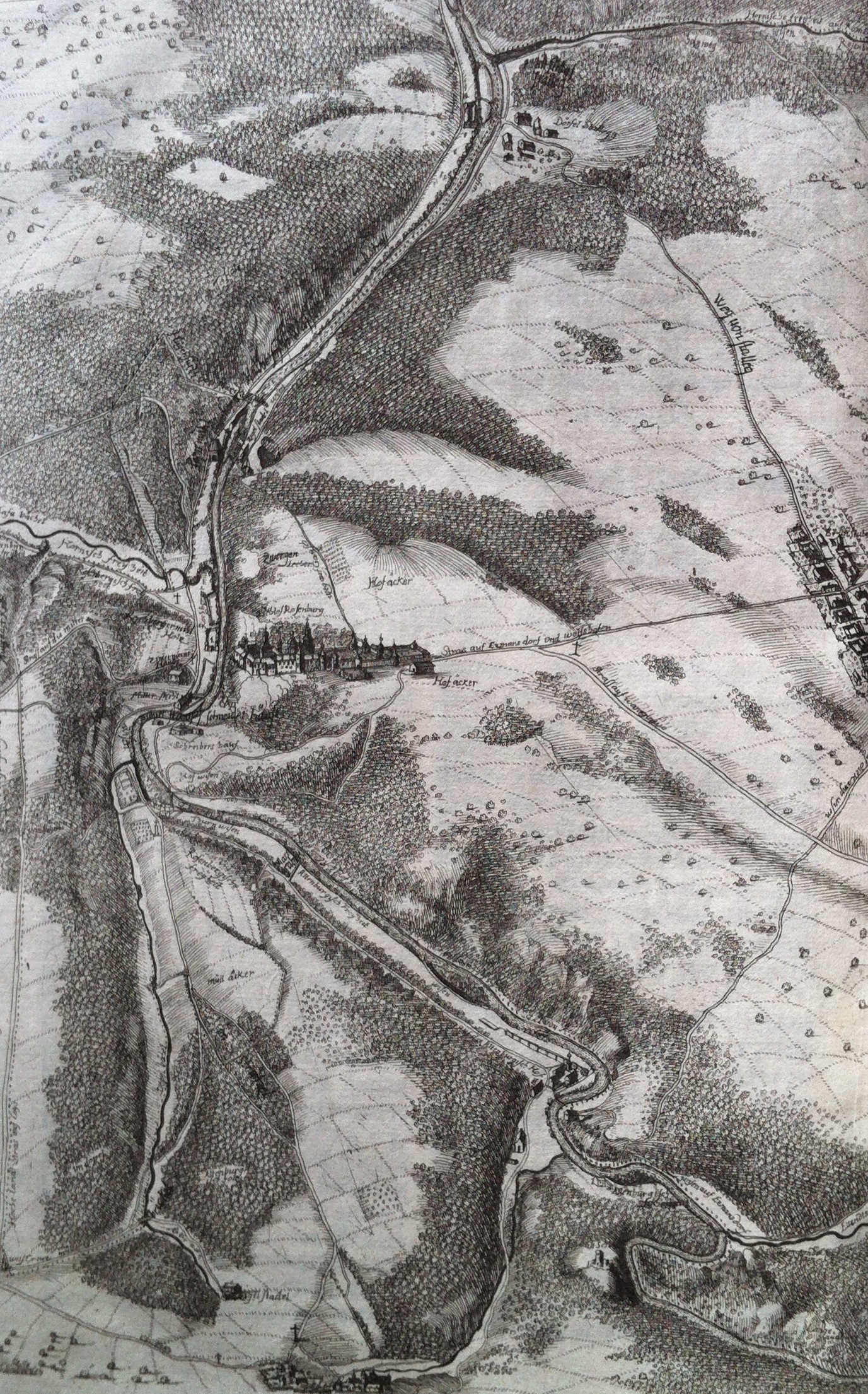 Die Herrschaft Rosenburg (Ausschnitt) in der Topographia Windhagiana Aucta, Wien 1673.